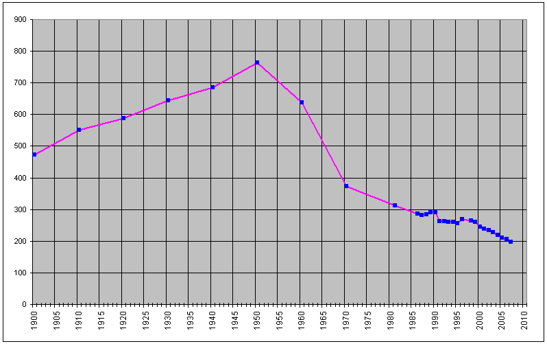 gráfico de evolución demográfica de Cobos de Cerrato durante el s.XX 1900-2007